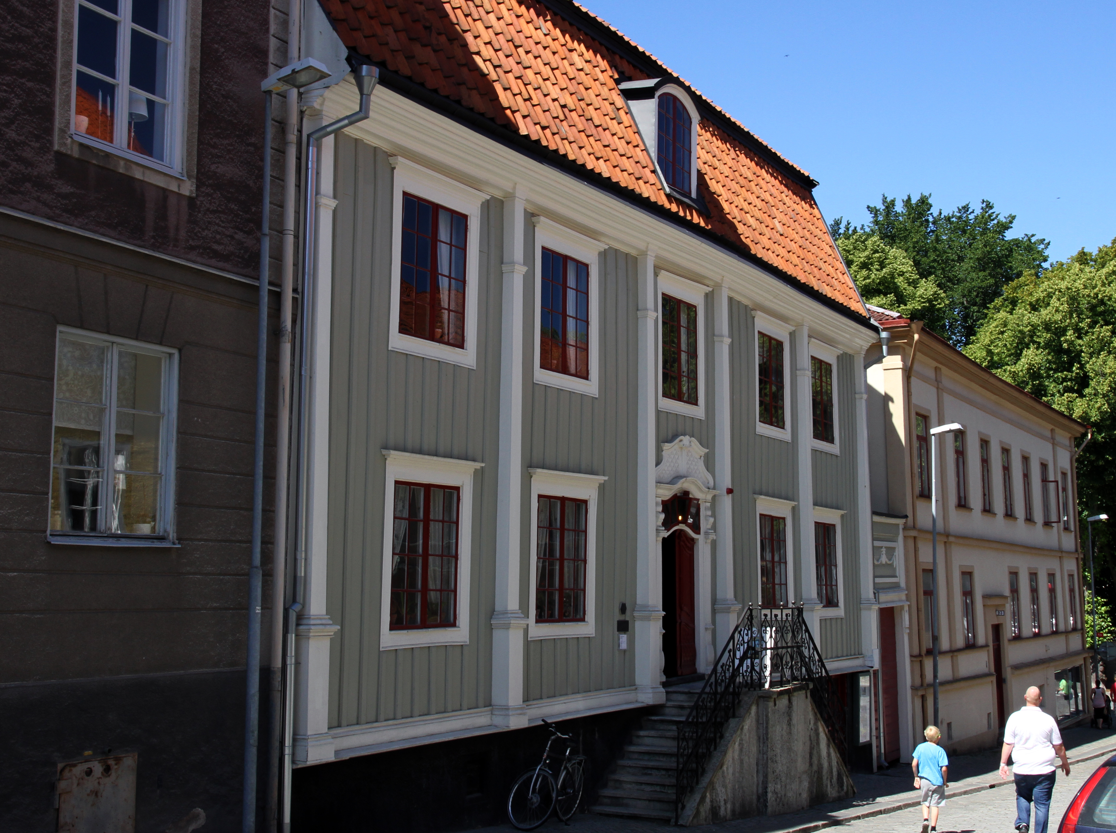 Skottbergska Gården, Karlshamn 17 juli 2015